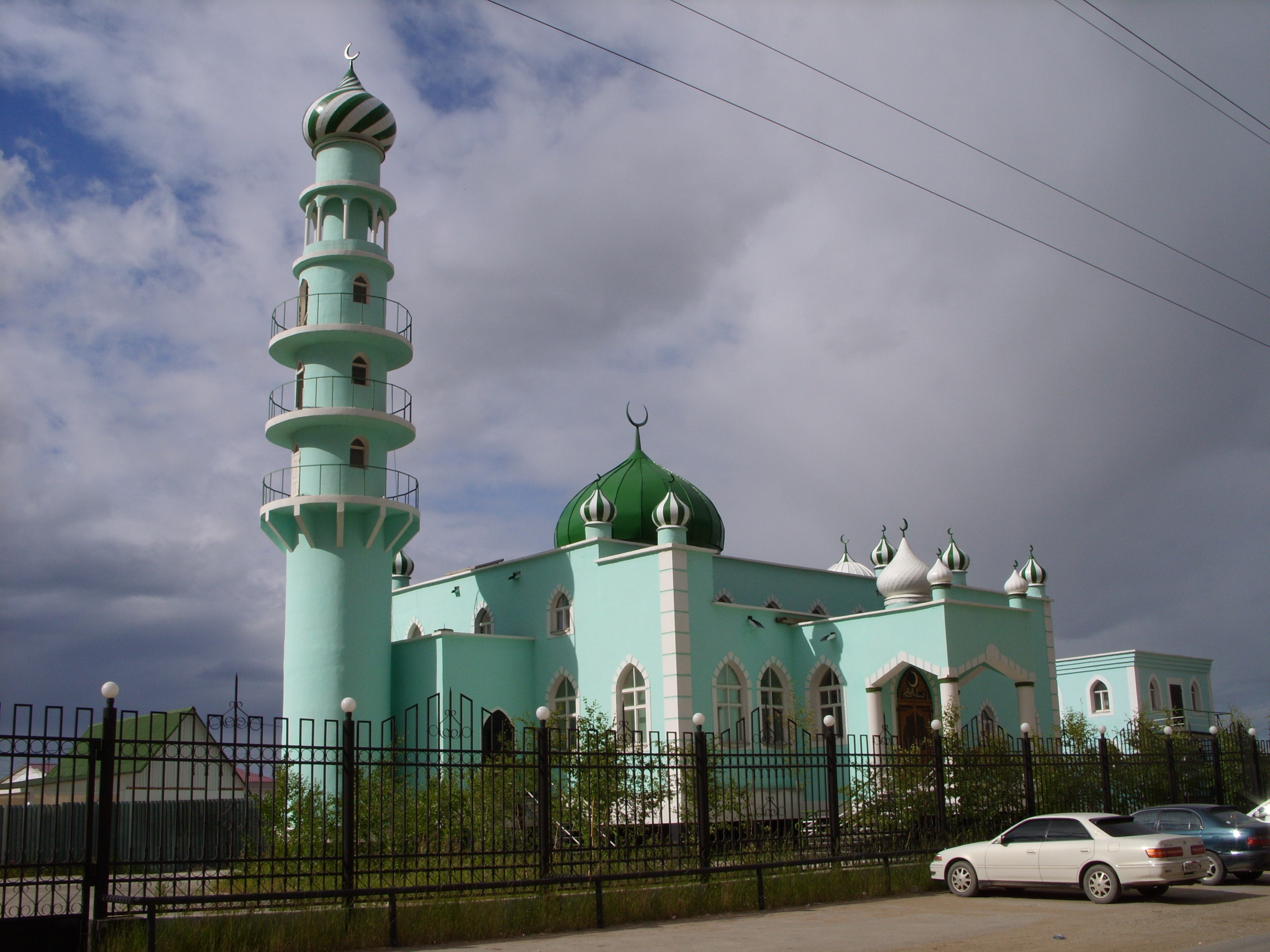 ул. Пирогова, 4